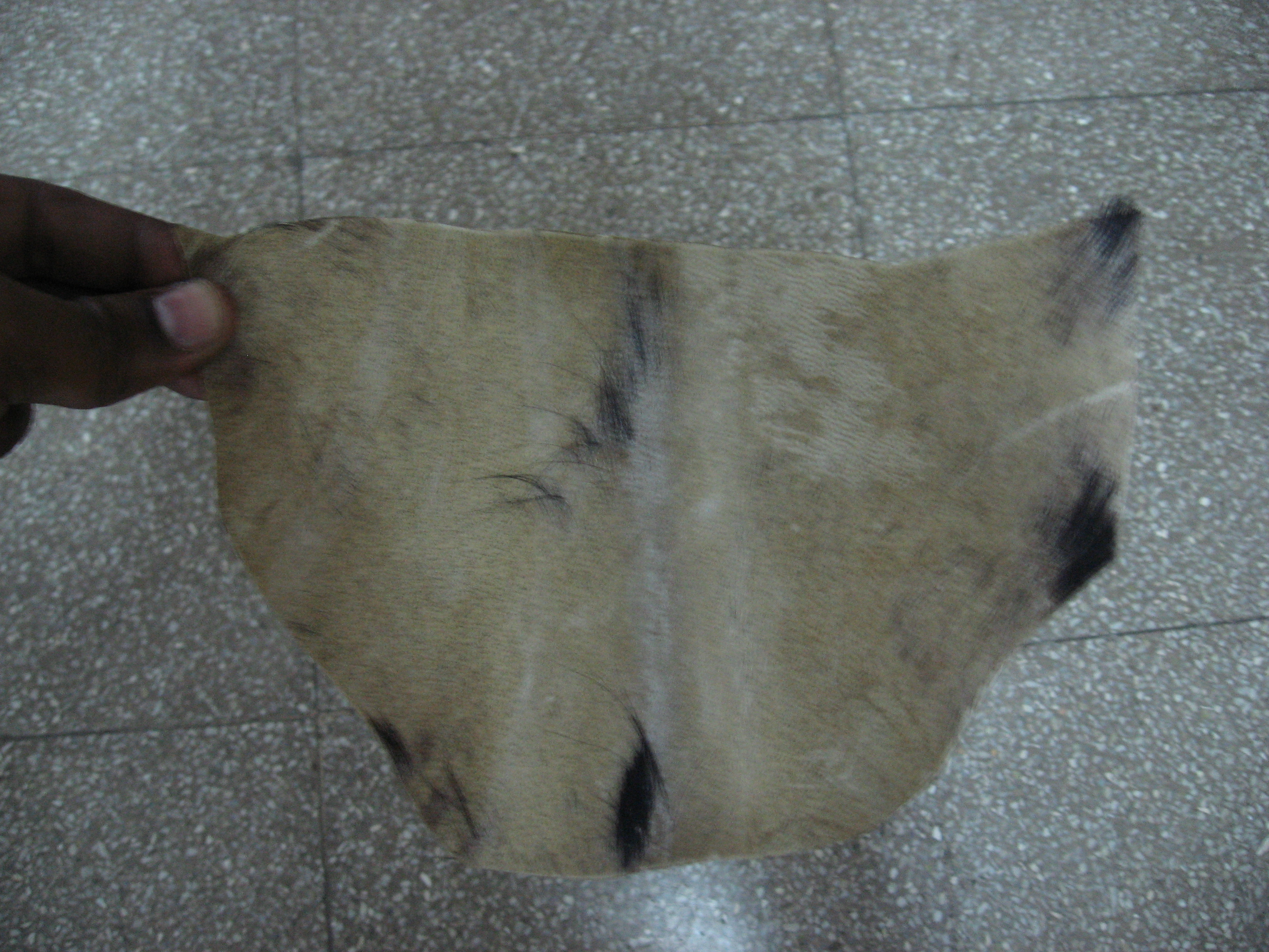 தோல் பாவை நிழற்கூத்து படங்கள் செய்ய பதப்படுத்தப்பட்ட ஆட்டின் தோல்